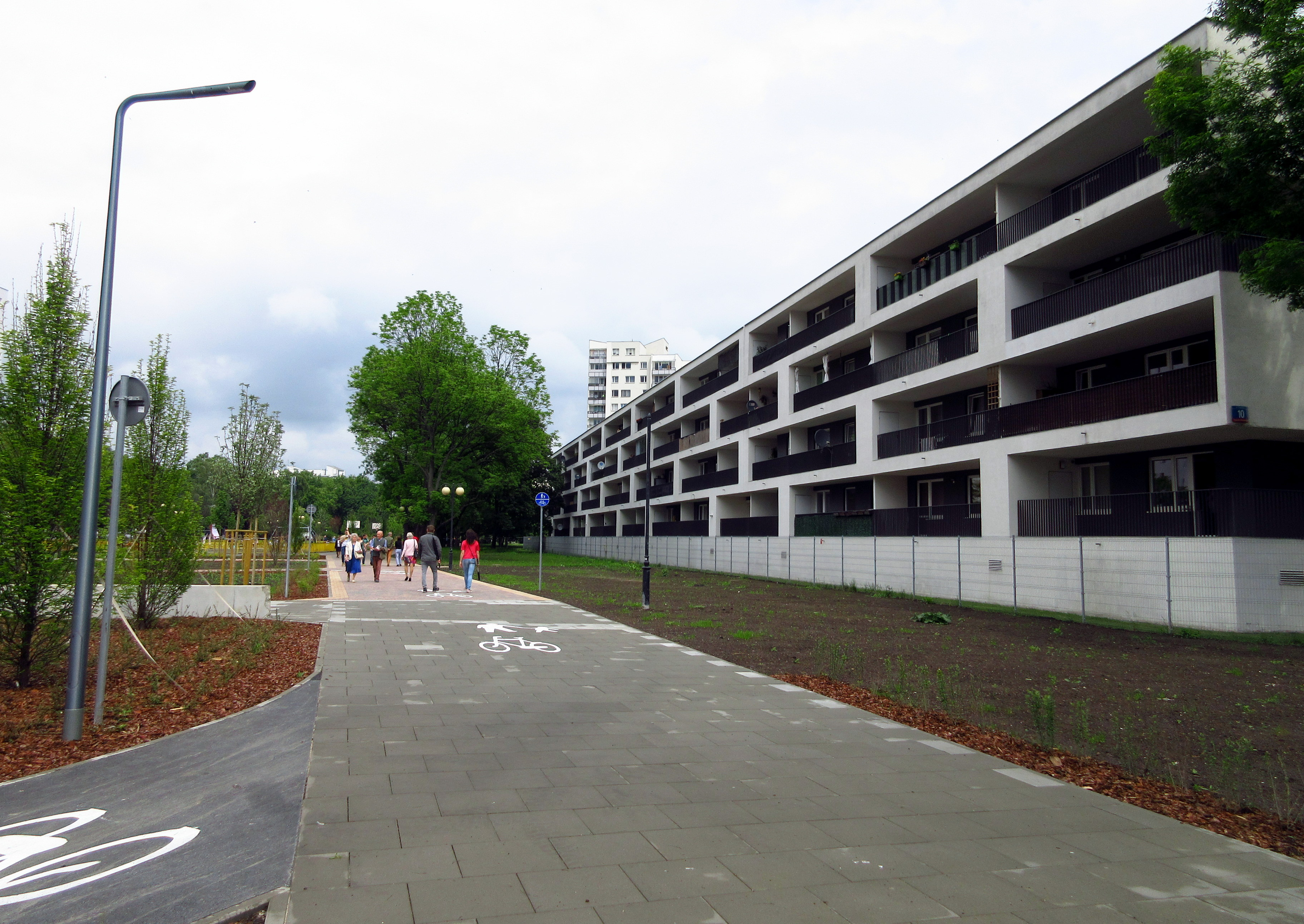 Deptak przy stacji metra Targówek Mieszkaniowy 2019 r.